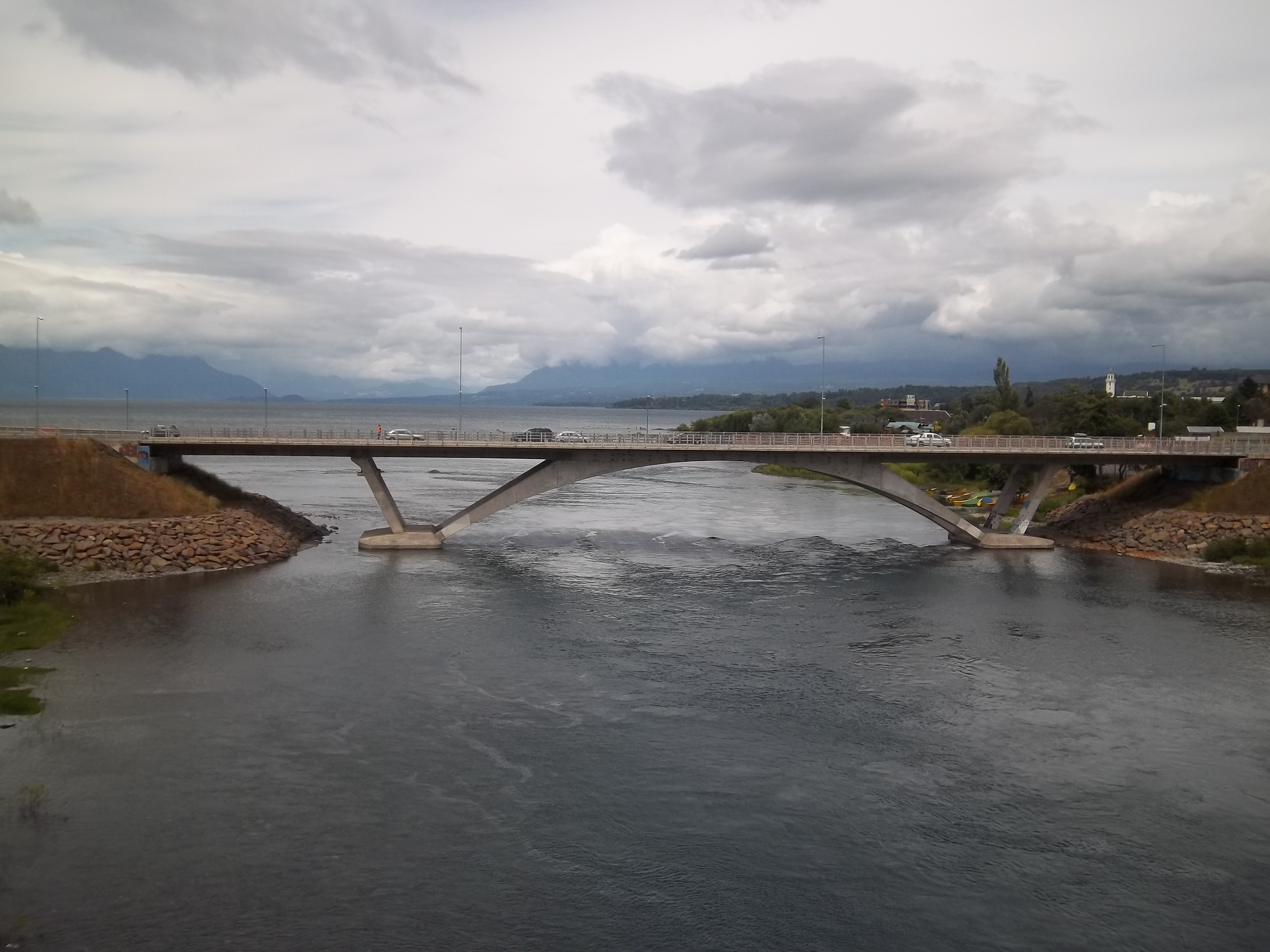 Puente de la ruta CH-199 sobre el río Toltén desde el antiguo puente Rodrigo de Bastidas en Villarrica, región de la Araucanía, Chile.